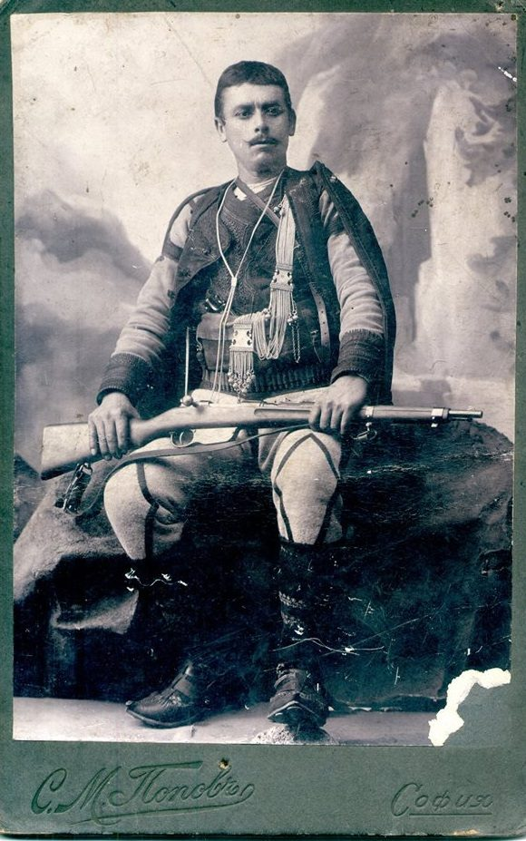 Hristo Argirov Čaušot, a macedonian revolutionary